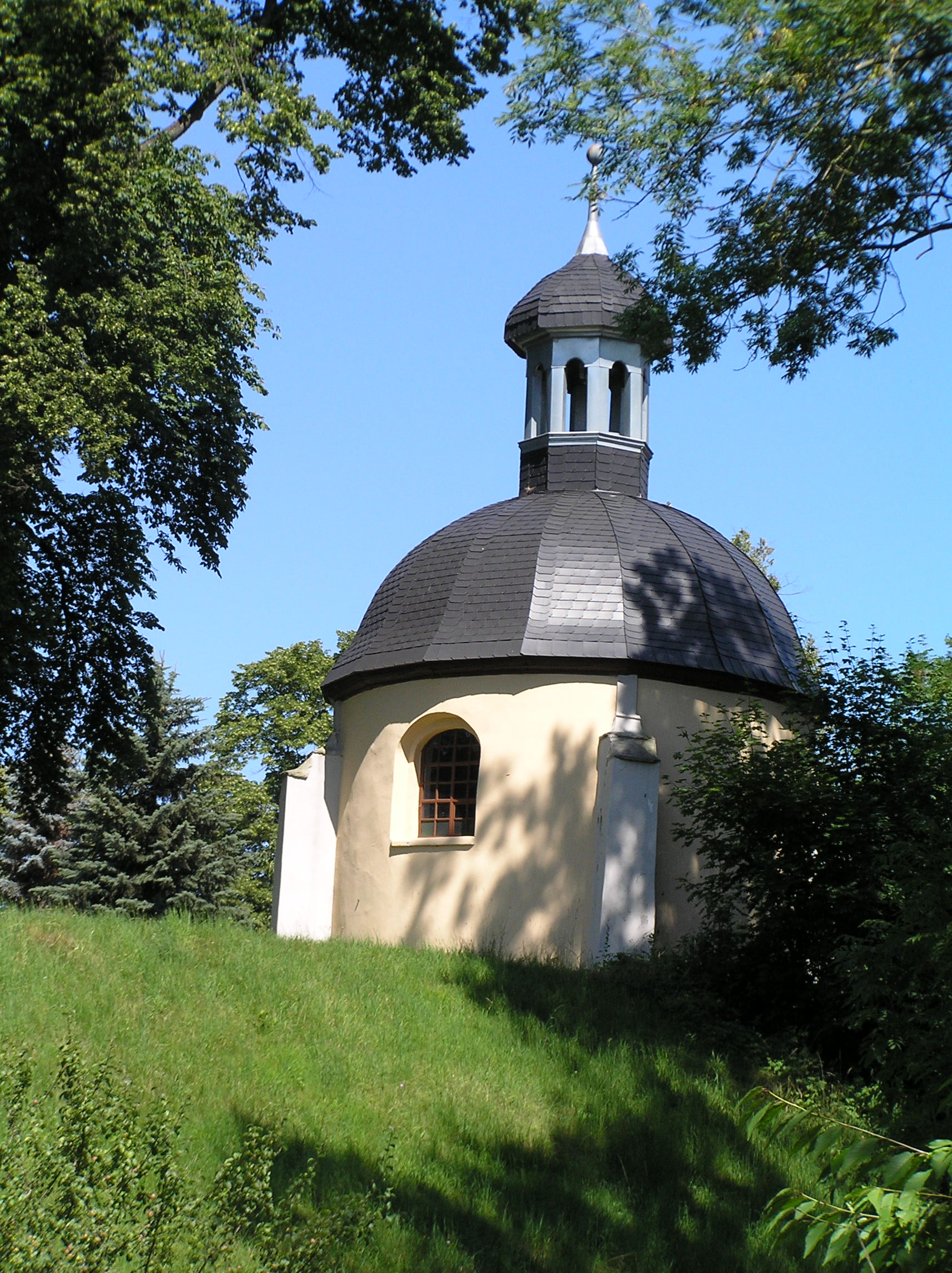 Hoření Starý Dub - kaple Navštívení Panny Marie